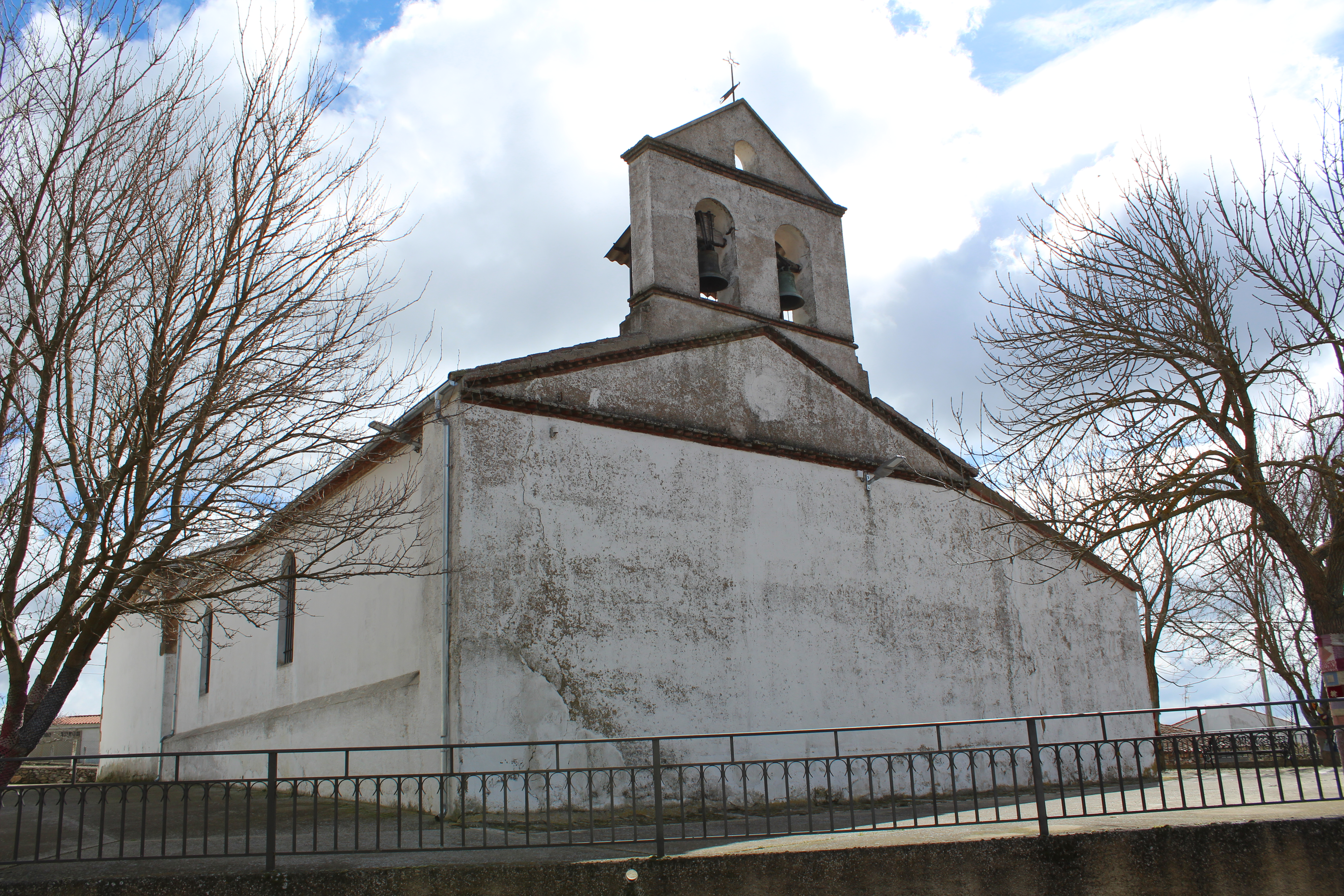 Frontal de la Iglesia de San Miguel Arcángel en Monterrubio de la Sierra, entre la Calle Alba y la Calle de la Iglesia.